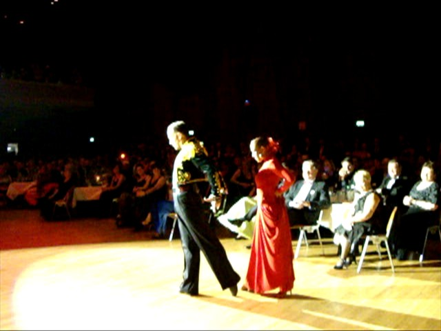 Pasodobl (isp. Paso doble "ikiqat addım")- ənənəvi olaraq Latınamerika rəqsləri əsasında IX əsrin sonlarında yaranmış, korridonu tərənnüm edən (burada rəqqas toreronu, onun partnyoru - rəqqasə isə qırmızı kətanı tərənnüm edir) ispan rəqsi.